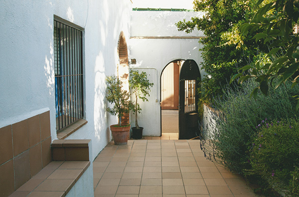 Centre d'Estudis Riudomencs